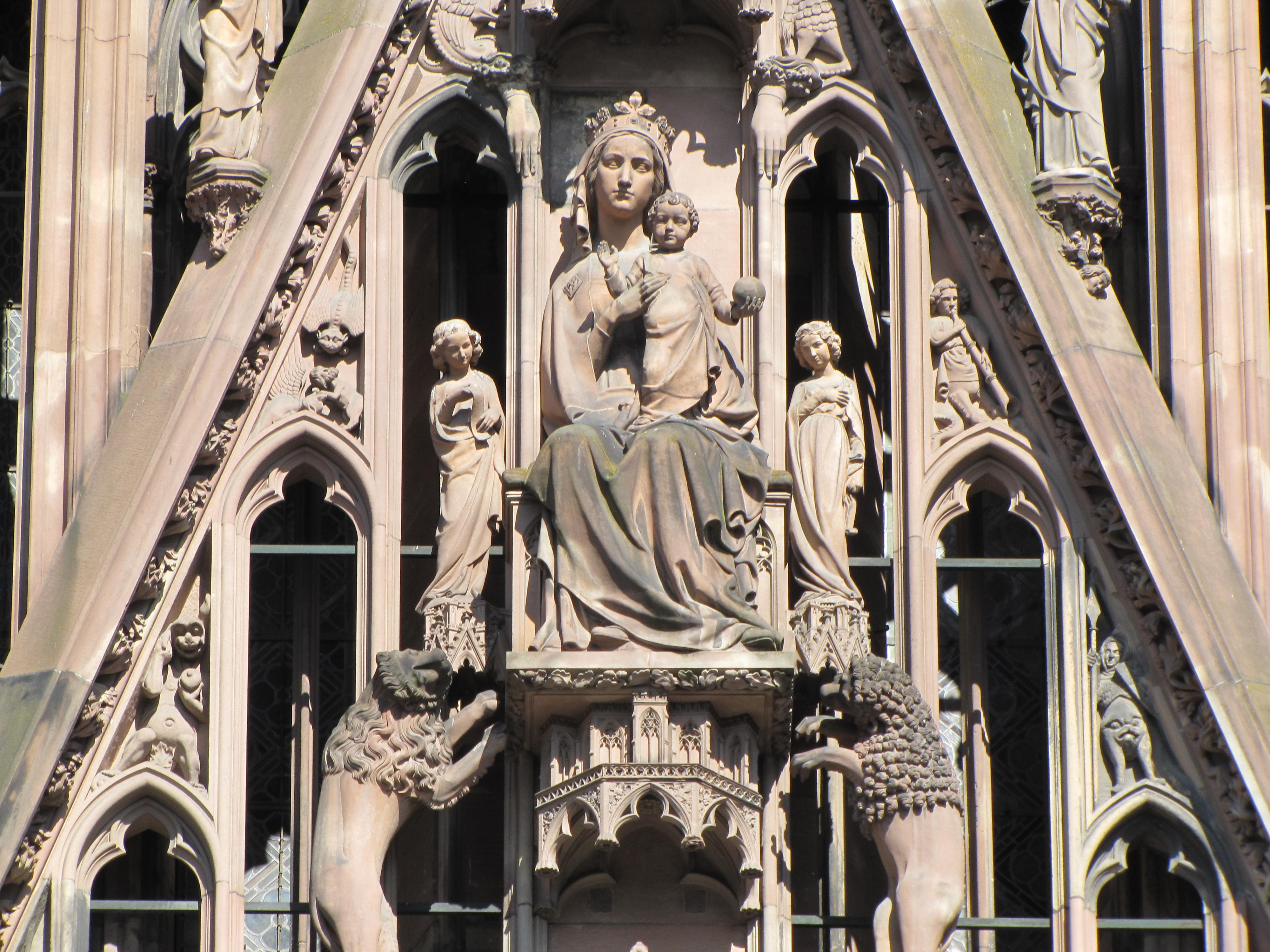 Alsace, Bas-Rhin, Cathédrale Notre-Dame de Strasbourg (PA00085015).Façade occidentale, Gable du portail principal, Vierge à l'enfant (neogothique!)